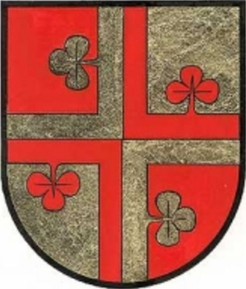 Da sich die Gemeinde Ottendorf a.d.R. aus vier Teilen zusammensetzt, sollte dies im Wappen ausgedrückt werden. Die heraldische Form hierfür ist die sogenannte Vierung, wobei der Wappenschild durch waagrechte Teilung und senkrechte Spaltung in vier Felder zerlegt wird, die aber aneinander geschoben ein Ganzes bilden, so die Einheit der Gemeinde veranschaulichend. Betont werden die vier Katastralgemeinden durch vier Kleeblätter. Diese wurden im Hinblick auf die geschichtliche Vergangenheit gewählt.